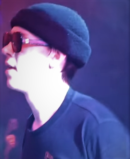 Place: Свобода